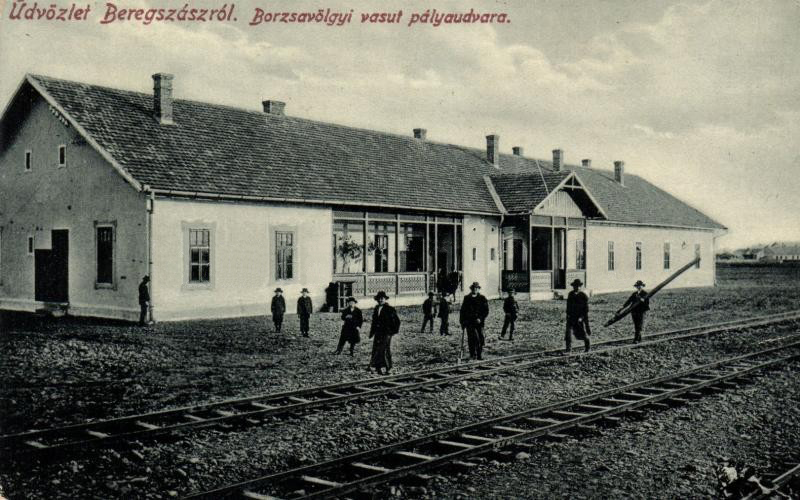 Будівля вокзалу Боржавської вузькоколійки в Берегові - 1917 рік